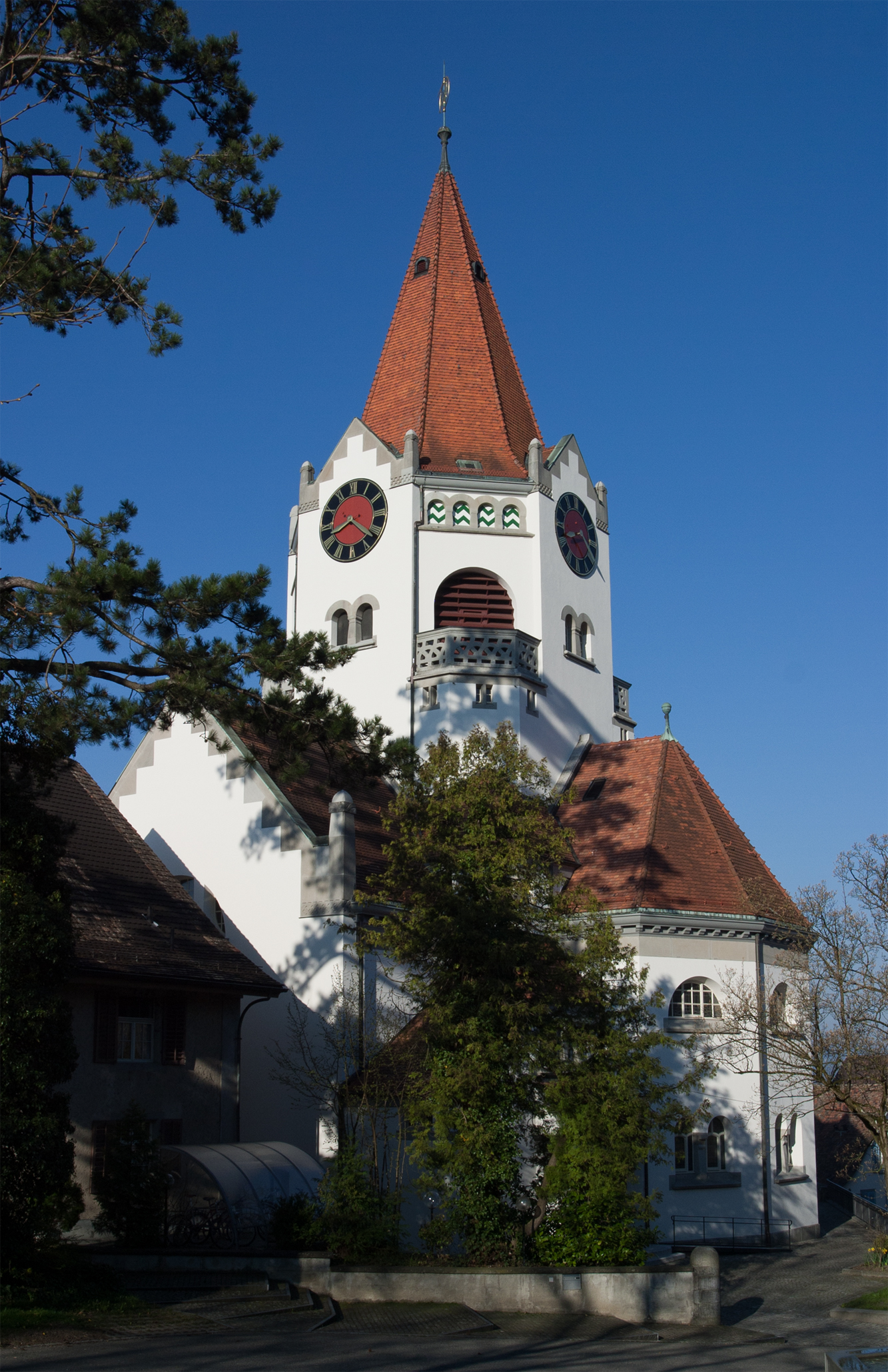 Reformierte Kirche in Weinfelden